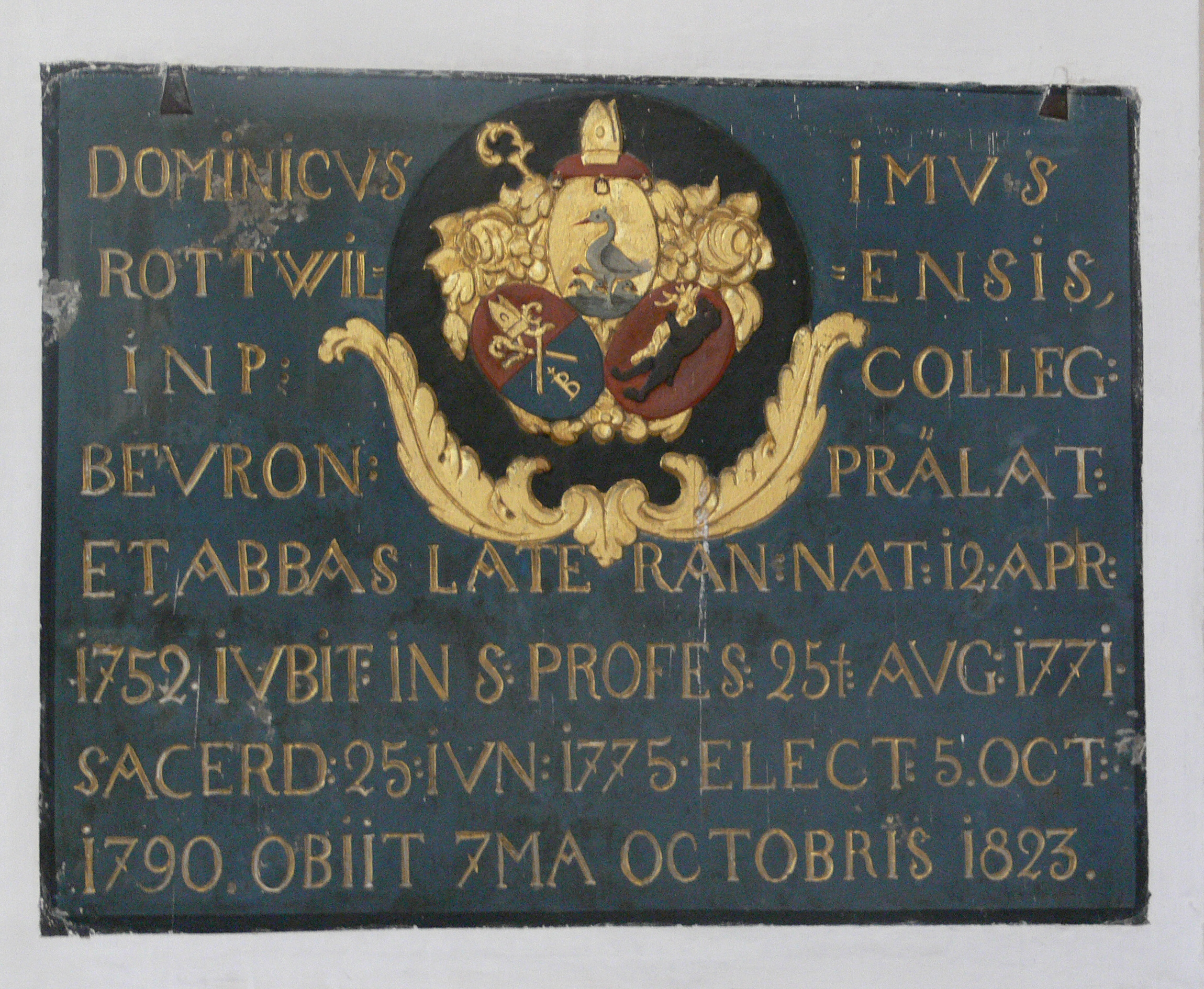 Abteikirche St. Martin, Beuron Epitaph für den letzen Abt (1790-1802) des Augustinerchorherrnstifts Beuron, Dominikus Maier aus Rottweil, † 1823